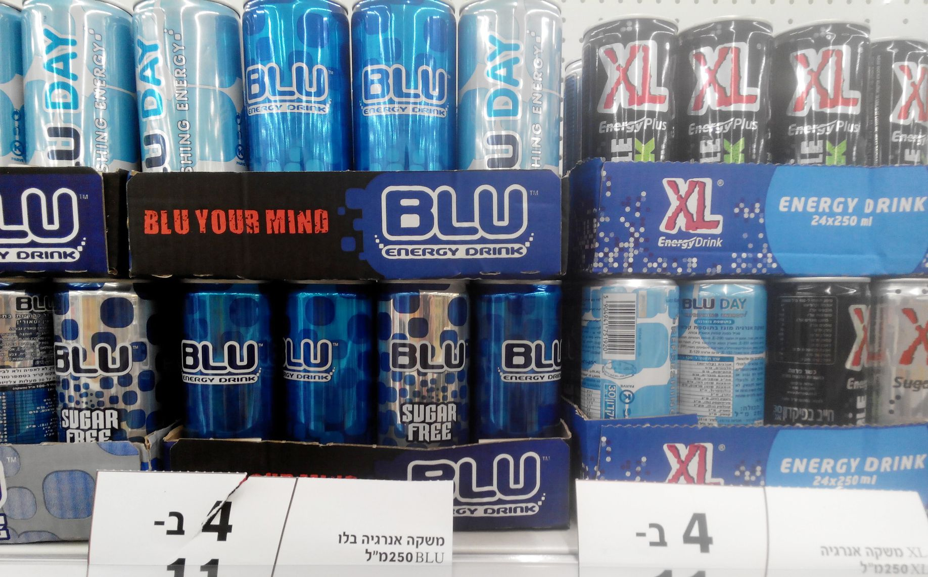 Energy Drinks cans